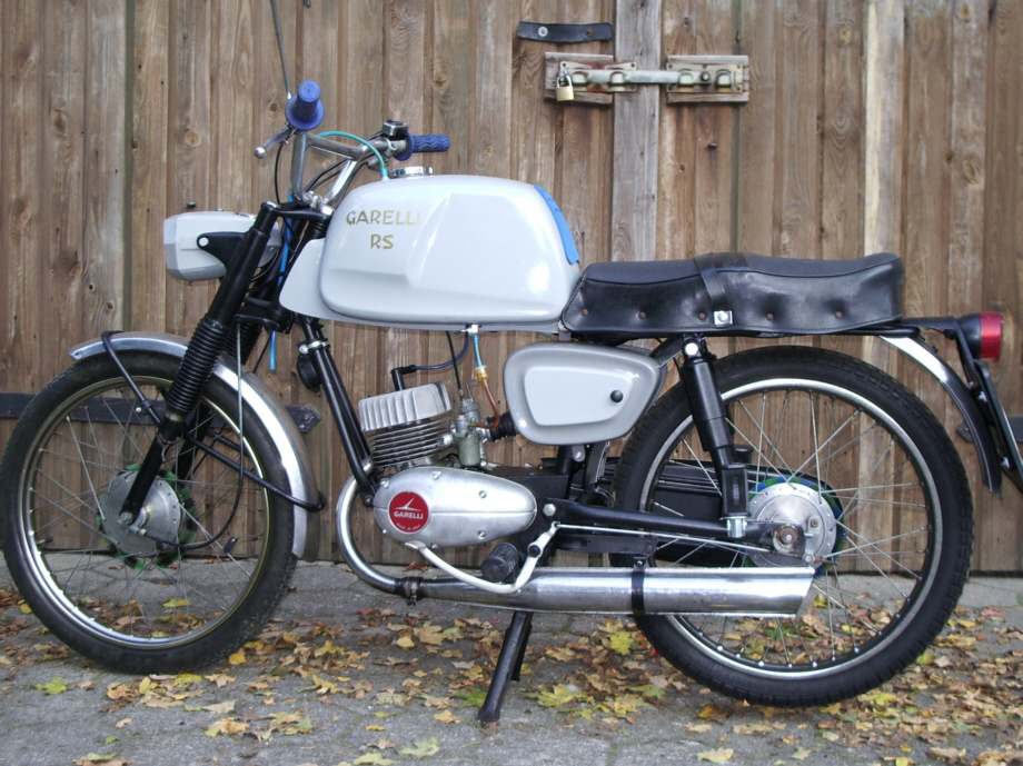 Garelli Leichtkraftrad. Eigenes Krad, selbst fotogafiert.